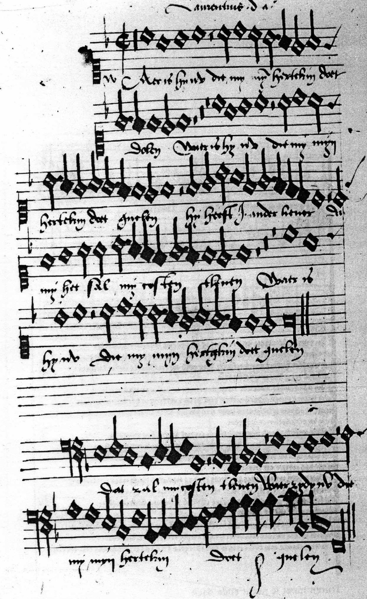 Een fragment van het Nederlandse lied "Waer is hy nu die my myn hertekin doet dolen" van het handschrift Lauweryn van Watervliet, Londen, British Library, 35087, folio 41v